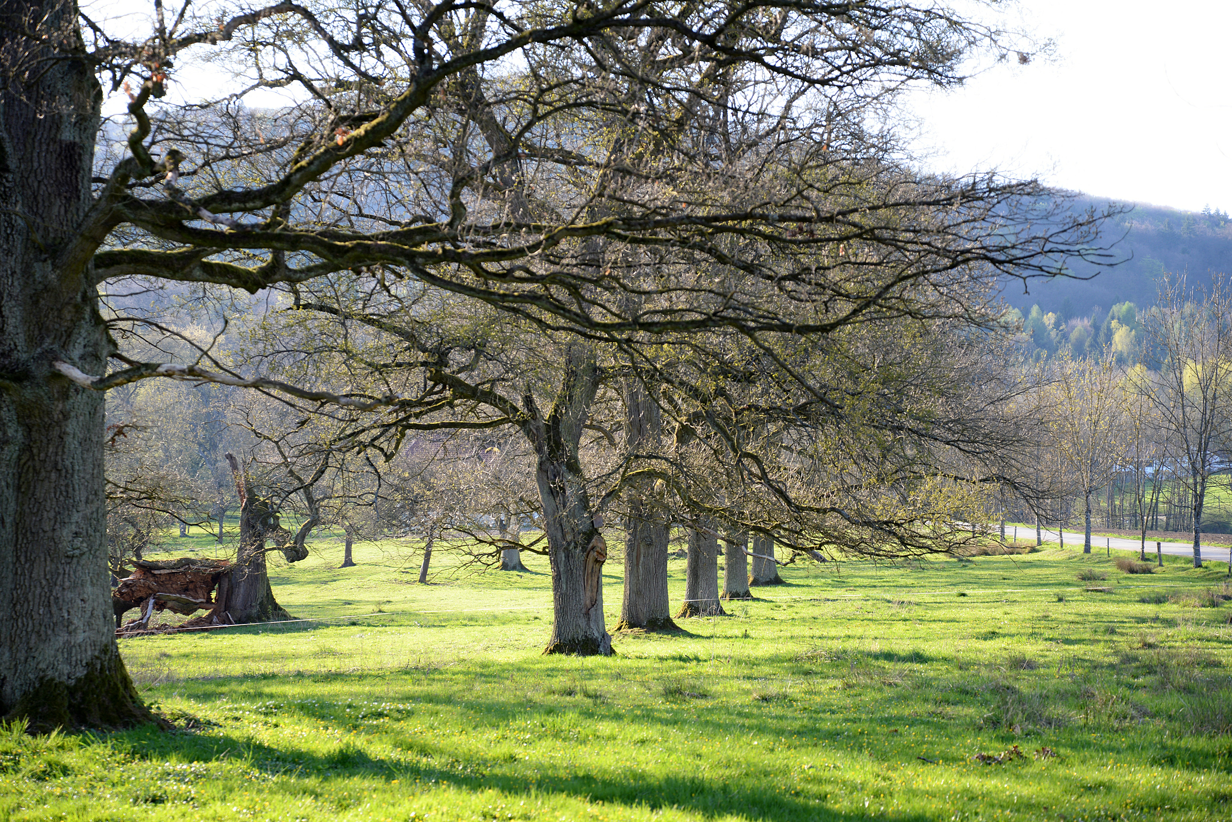 Der Altensittenbacher Anger bei Hersbruck dient noch heute als Weidefläche für Rinder.